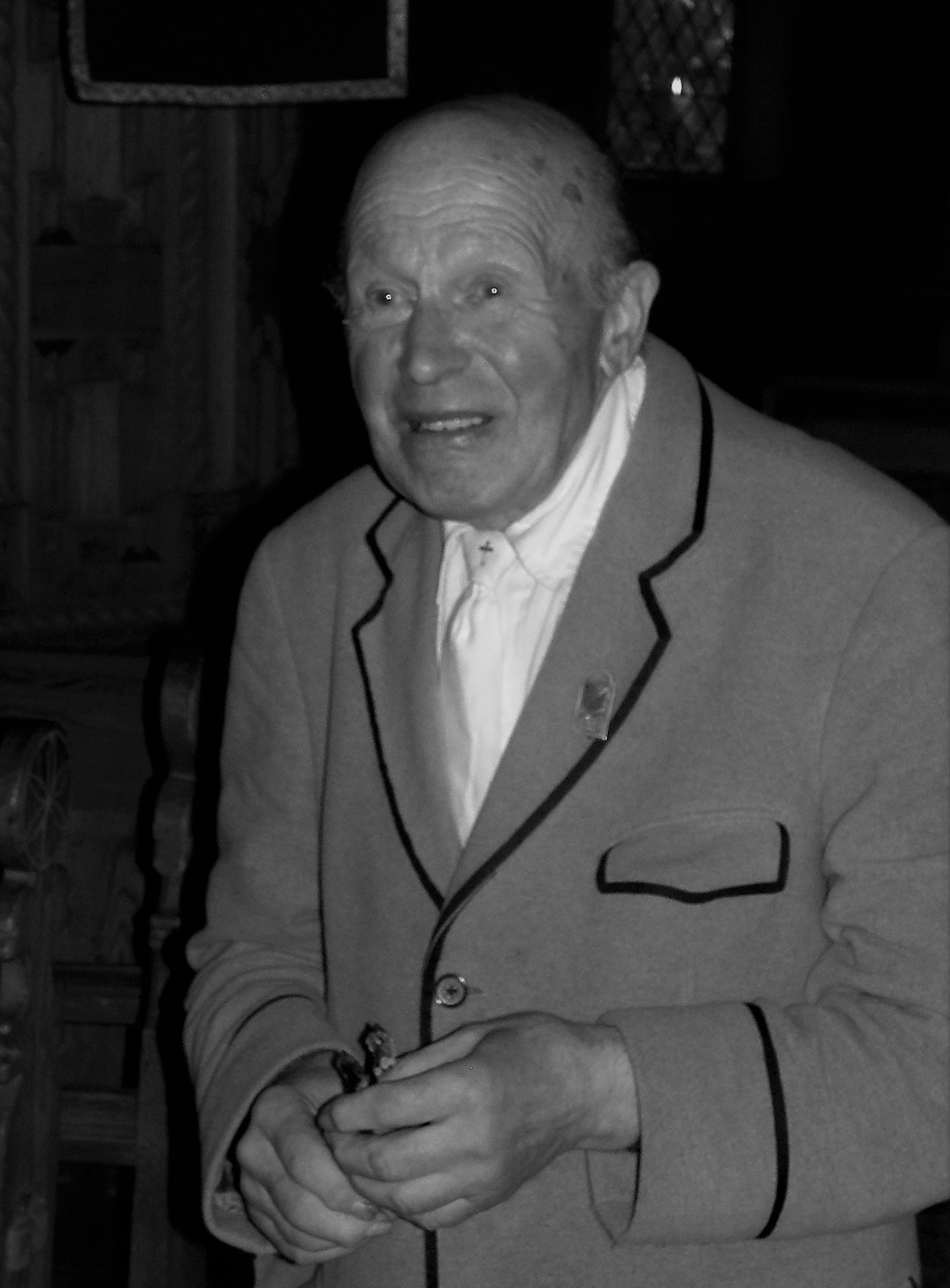 Harry Rein, eesti kirikuõpetaja